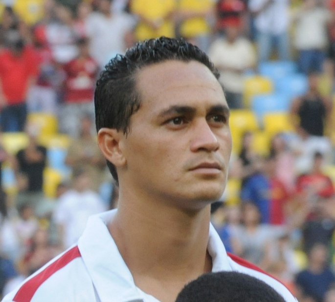 Edson Lemaire